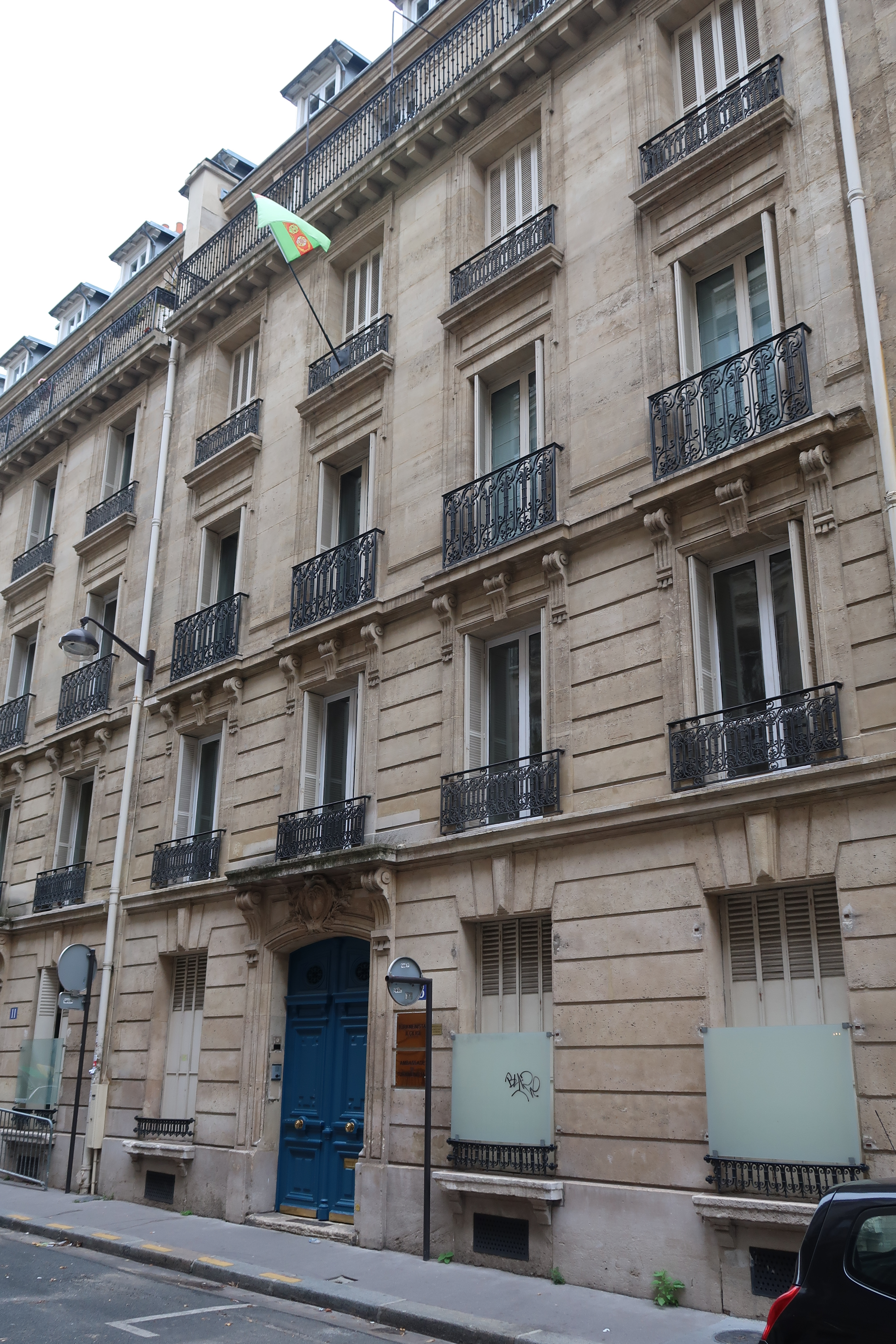 Ambassade du Turkménistan en France, 13 rue Picot (Paris 16e).